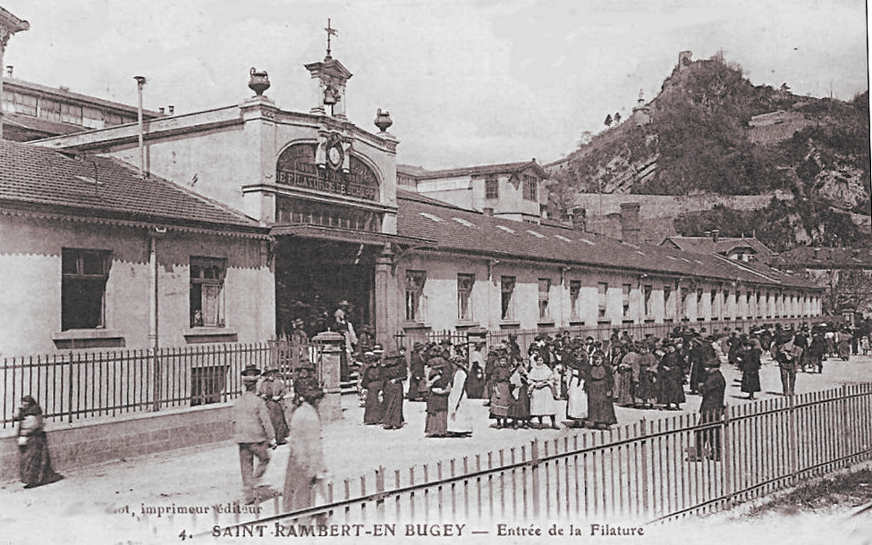 Sortie des ouvriers de la filature